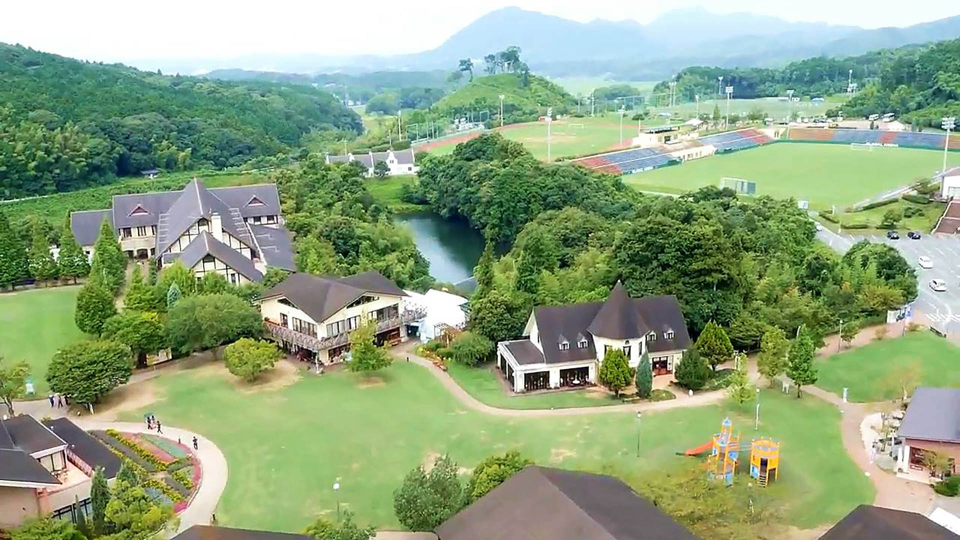 グローバルアリーナの全体が分かる画像です（写っていないものもあります（体育館・テニスなど））